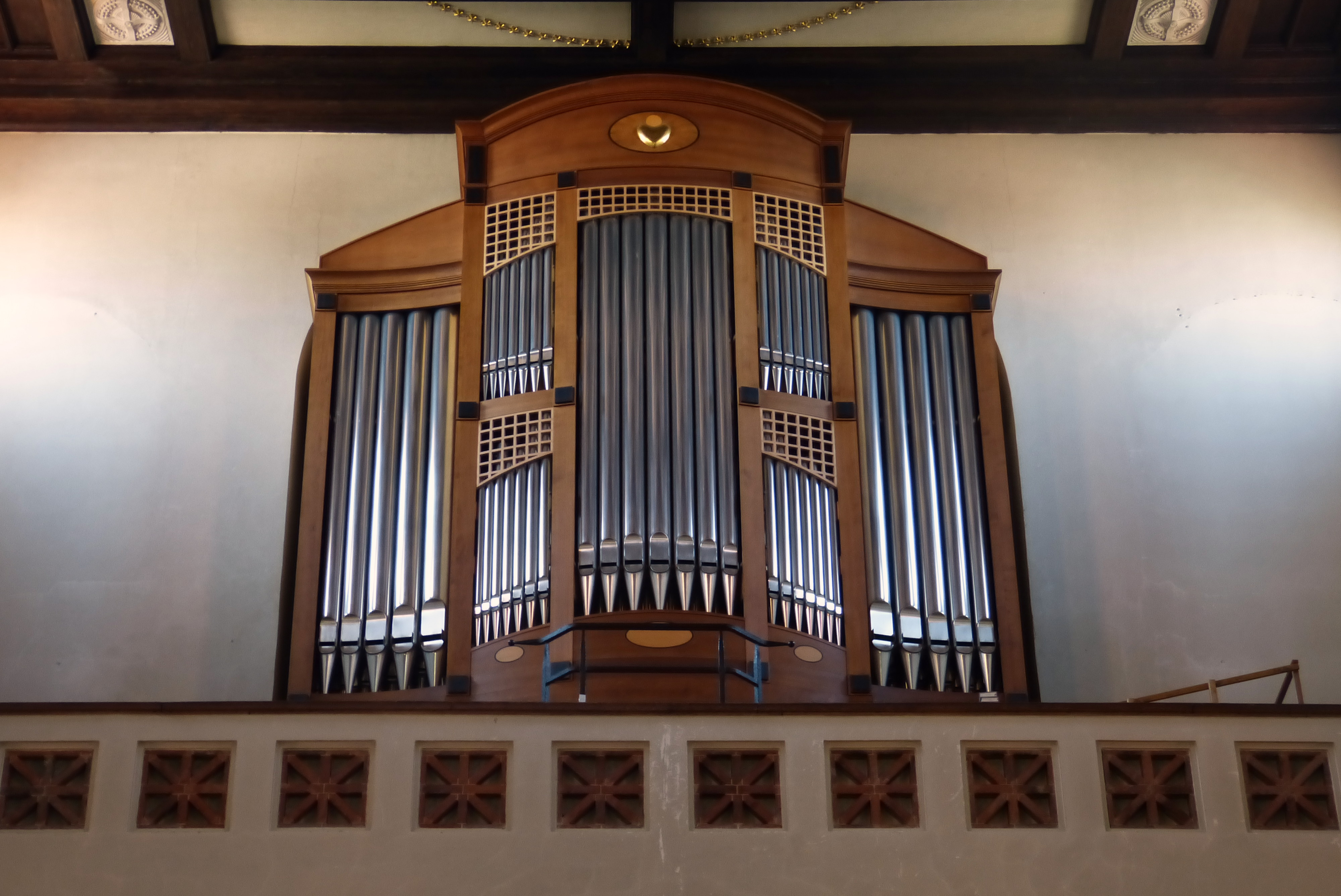 Emporenorgel der Herz-Jesu-Kirche in Augsburg This is a photograph of an architectural monument.